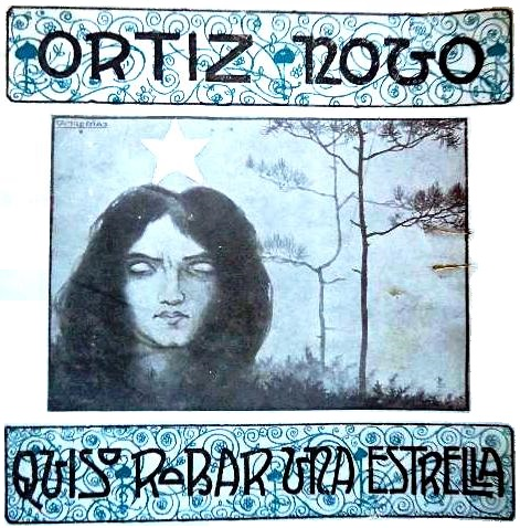 Quiso robar una estrella de Manuel Ortiz Novo, 1923